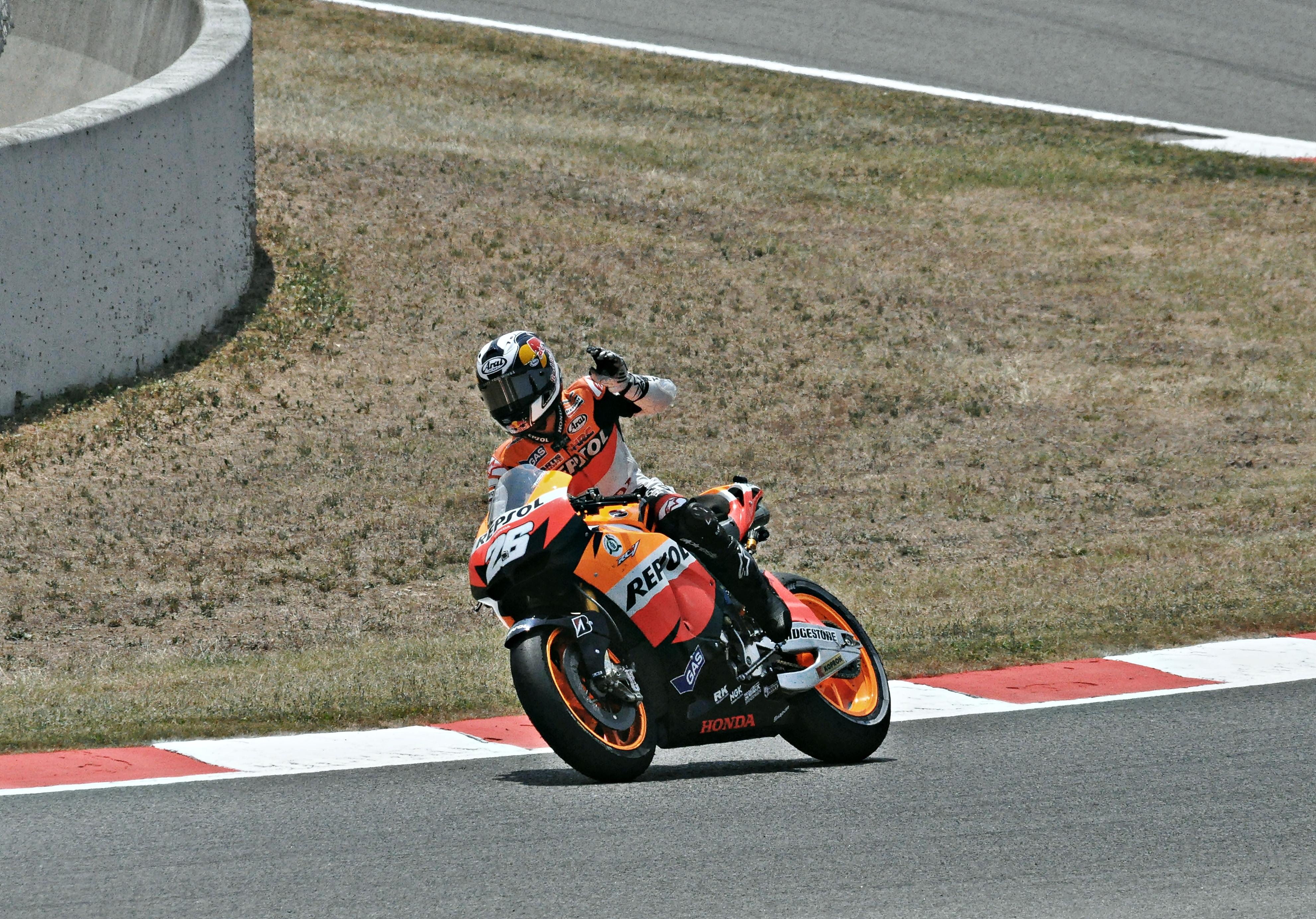 gran premio de cataluña